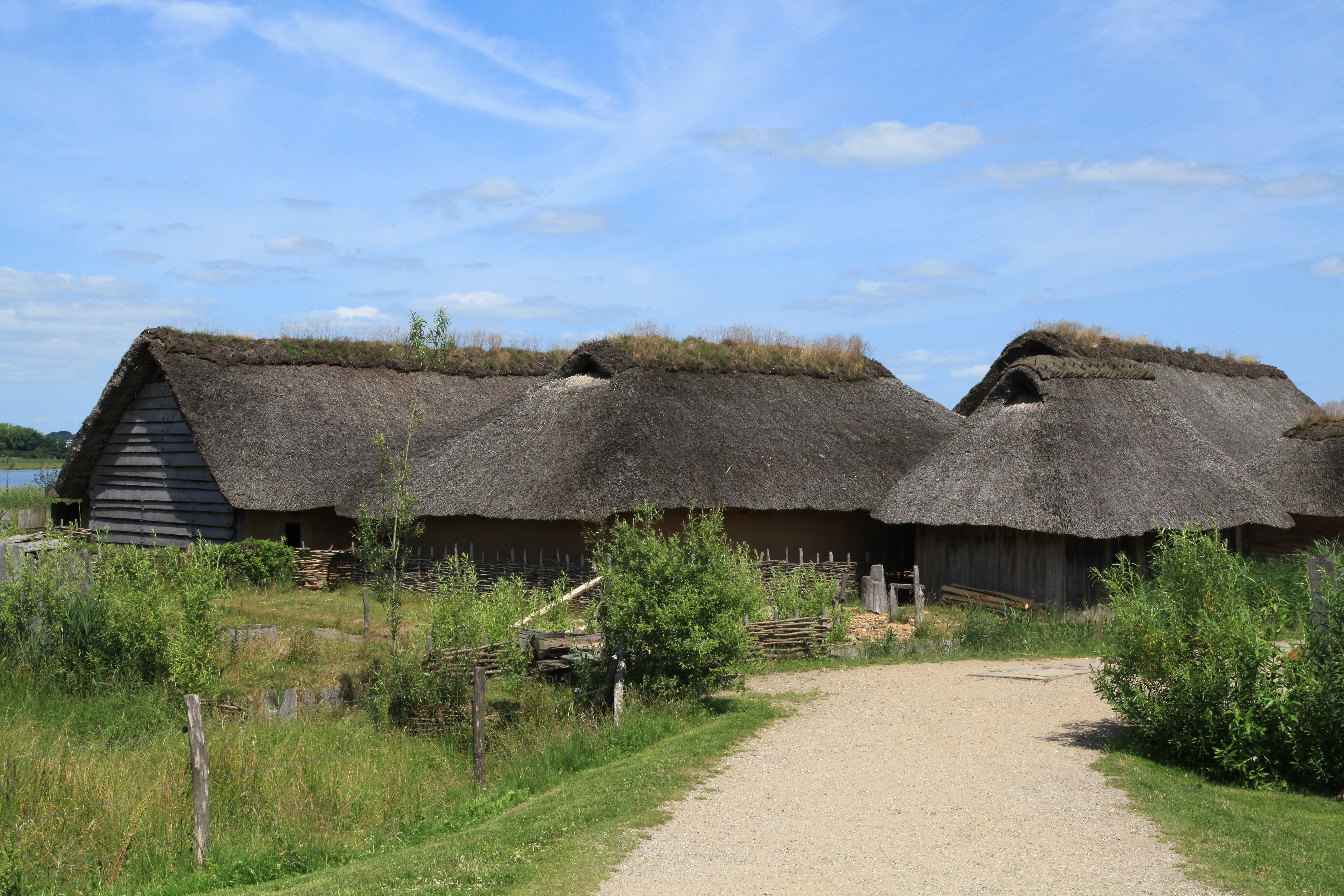 Freilichtmuseum: Rekonstruierte Wikinger-Häuser von Haithabu in Busdorf